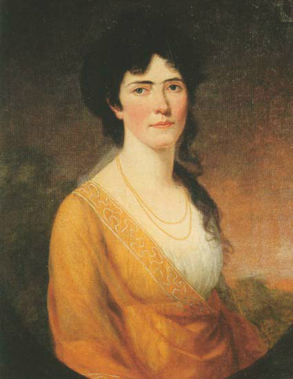 Sie heiratete als 21jährige am 9. März 1797 in Karlsruhe den 41jährigen verwitweten Herzog Maximilian Joseph von der Pfalz-Zweibrücken, nachmalig Kurfürst und seit 1806 König von Bayern. Sie war die erste Königin Bayerns.